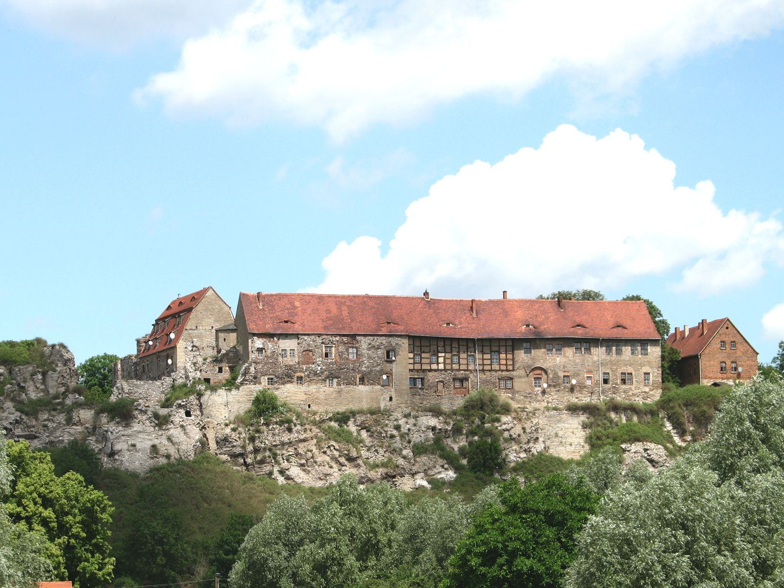 Castle Wendelstein ruins, Saxony-Anhalt, Germany